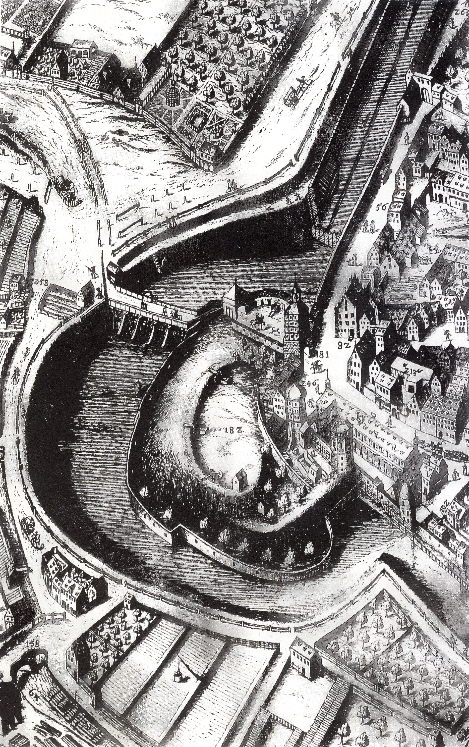 Ausschnitt aus dem Kilianplan von Augsburg, 1626 in acht Teilen in Kupfer gestochen von Wolfgang Kilian auf Basis der Vermessungen von Christoph Schissler (Stand ca. 1600). Der Ausschnitt zeigt den Bereich der Stadtbefestigung um den Roten-Torwall, mit dem breiten wassergefüllten Stadtgraben, der Aquaedukt-Brücke zum Roten Tor, dem Wasserwerk am Roten Tor mit dem Großen Wasserturm und dem Kastenturm. Das Heilig-Geist-Spital von Elias Holl ist in diesem Plan bereits eingezeichnet, obwohl es zu dem Zeitpunkt erst in Planung bzw. noch im Bau war.